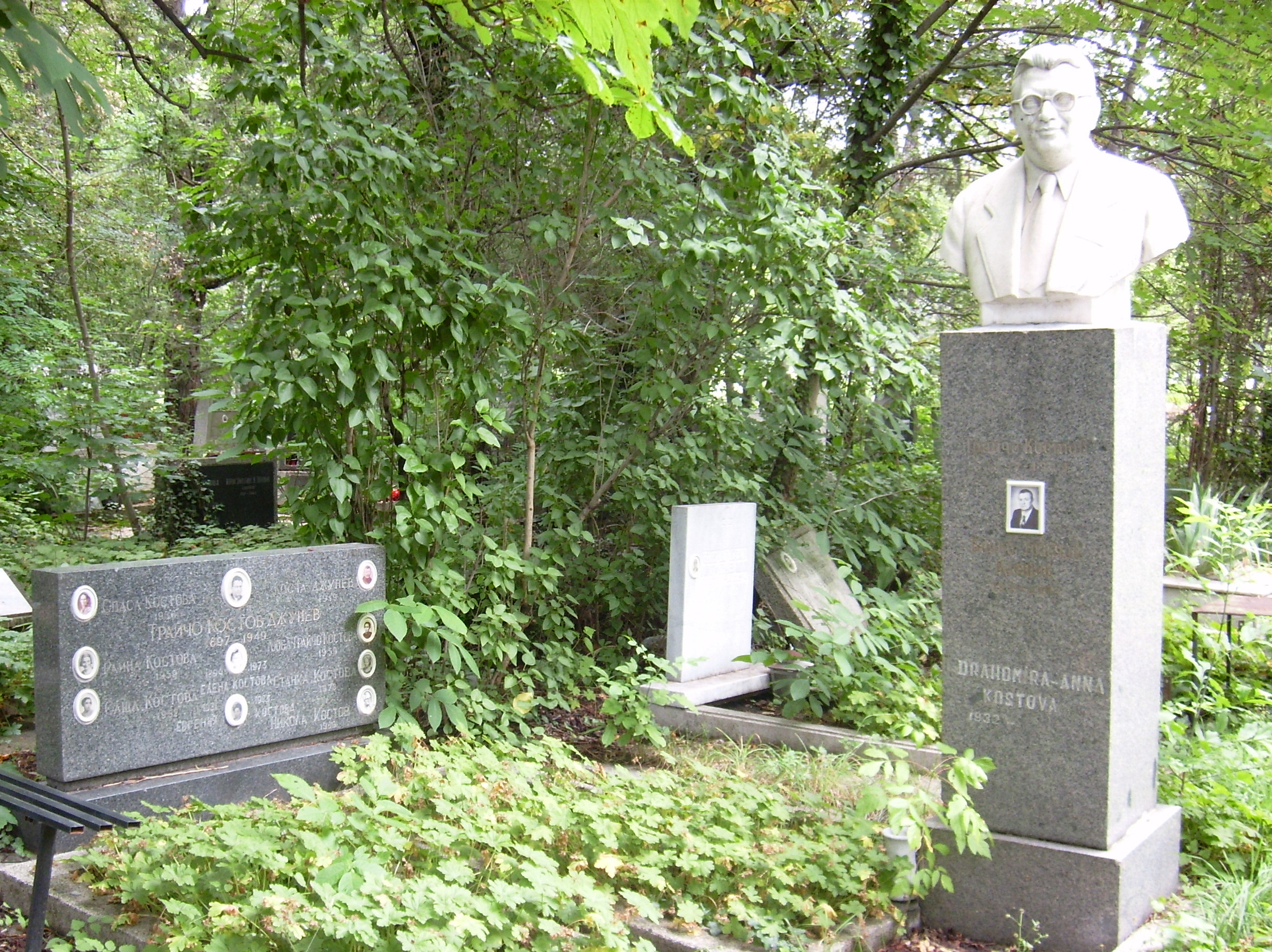 Гробът на Трайчо Костов на Софийските централни гробища